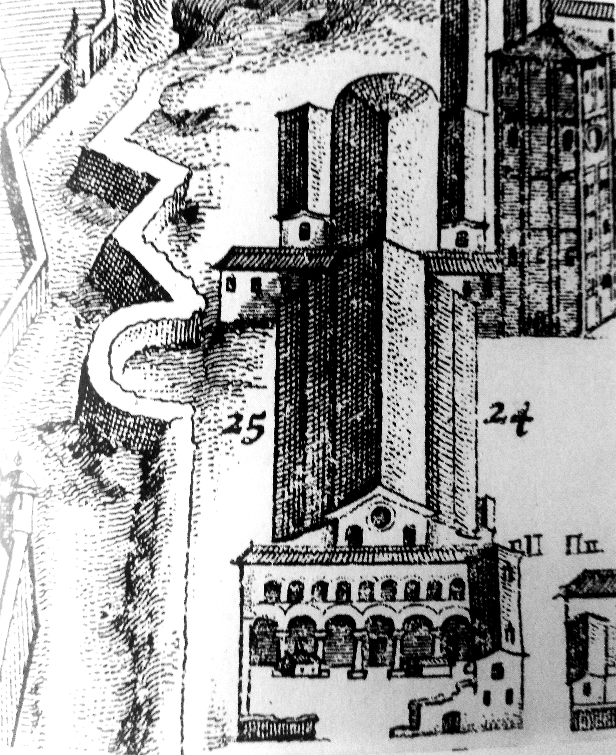 Tommaso Borgonio, Particolare della veduta del Duomo di Vercelli. 1680 ca.